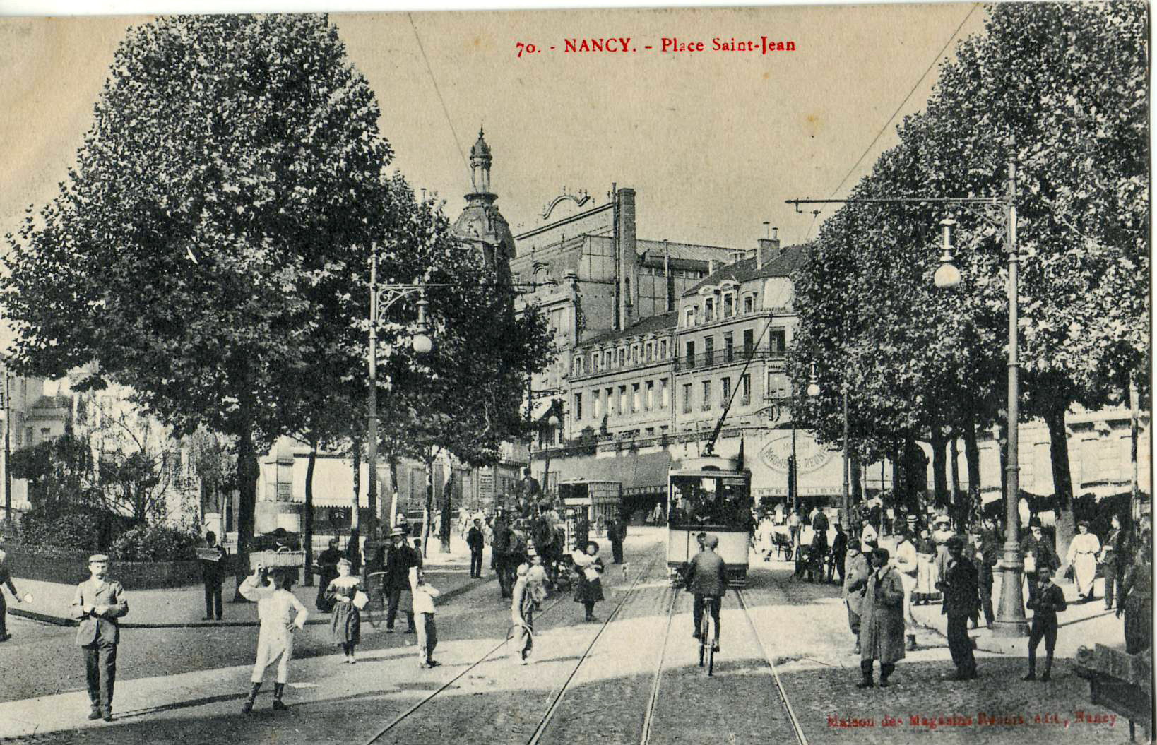 Carte postale ancienne éditée par Maison des Magasins réunis, n°70 :NANCY - Place Saint-Jean (actuelle place André-Maginot)